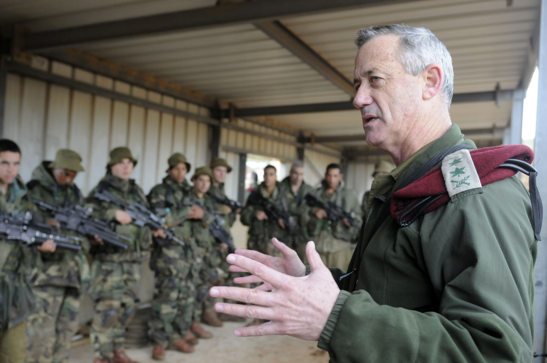 As part of ongoing efforts to improve the fitness and preparedness levels of the IDF, the Chief of the General Staff, Lt. Gen. Benny Gantz, conducted a surprise visit to training bases in order to check the infantry corps' training courses. Visits were simultaneously conducted in five different IDF infantry training bases. Photography: Cpl. Ori Shifrin, IDF Spokesperson's Unit "דובר צה"ל מוסר כי במסגרת פעילות מתמשכת לשיפור רמת הכשירות והכוננות של צה"ל, הוביל הבוקר הרמטכ"ל, רב-אלוף בני גנץ, ביקורת פתע מיוחדת שמטרתה לבדוק את מסלול הכשרת לוחם החי"ר. הביקורת נערכת במקביל בחמישה מבסיסי האימונים של חטיבות החי"ר של צה"ל."